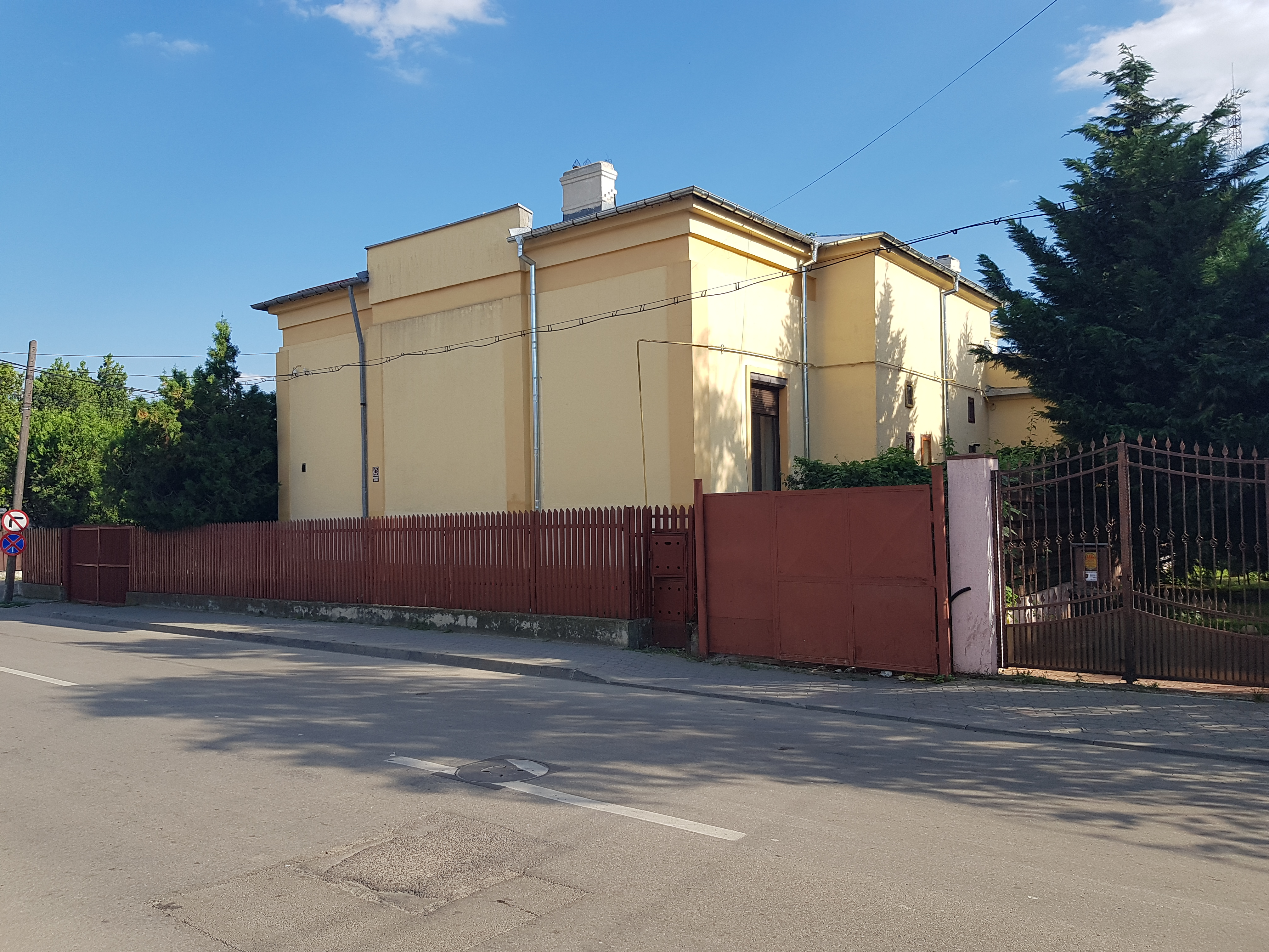 Casa colonel Patriciu